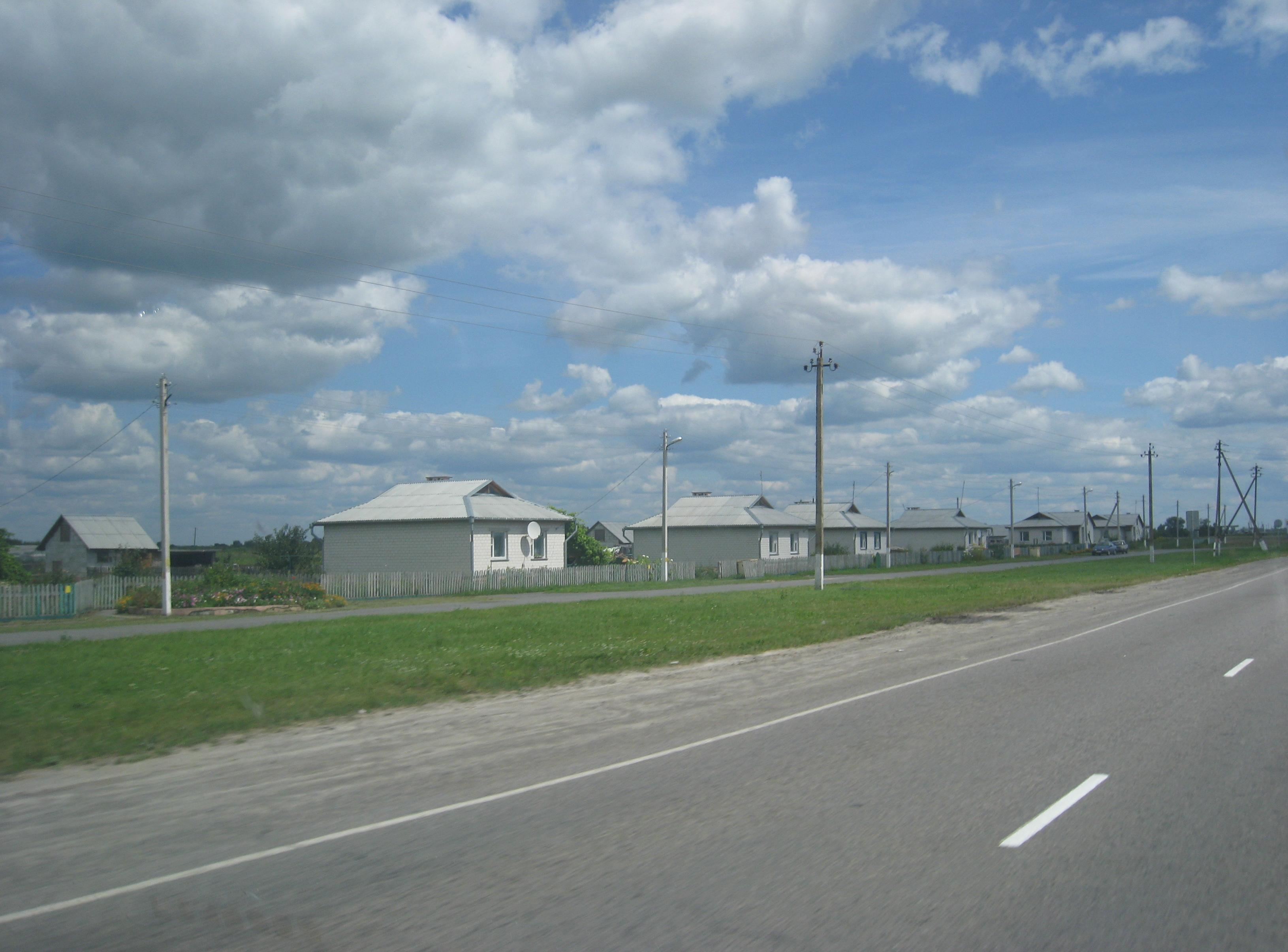 Вуліца сучаснага Турава (Р88). Уздоўж вуліцы пабудаваныя так званыя "Прэзыдэнцкія домікі".